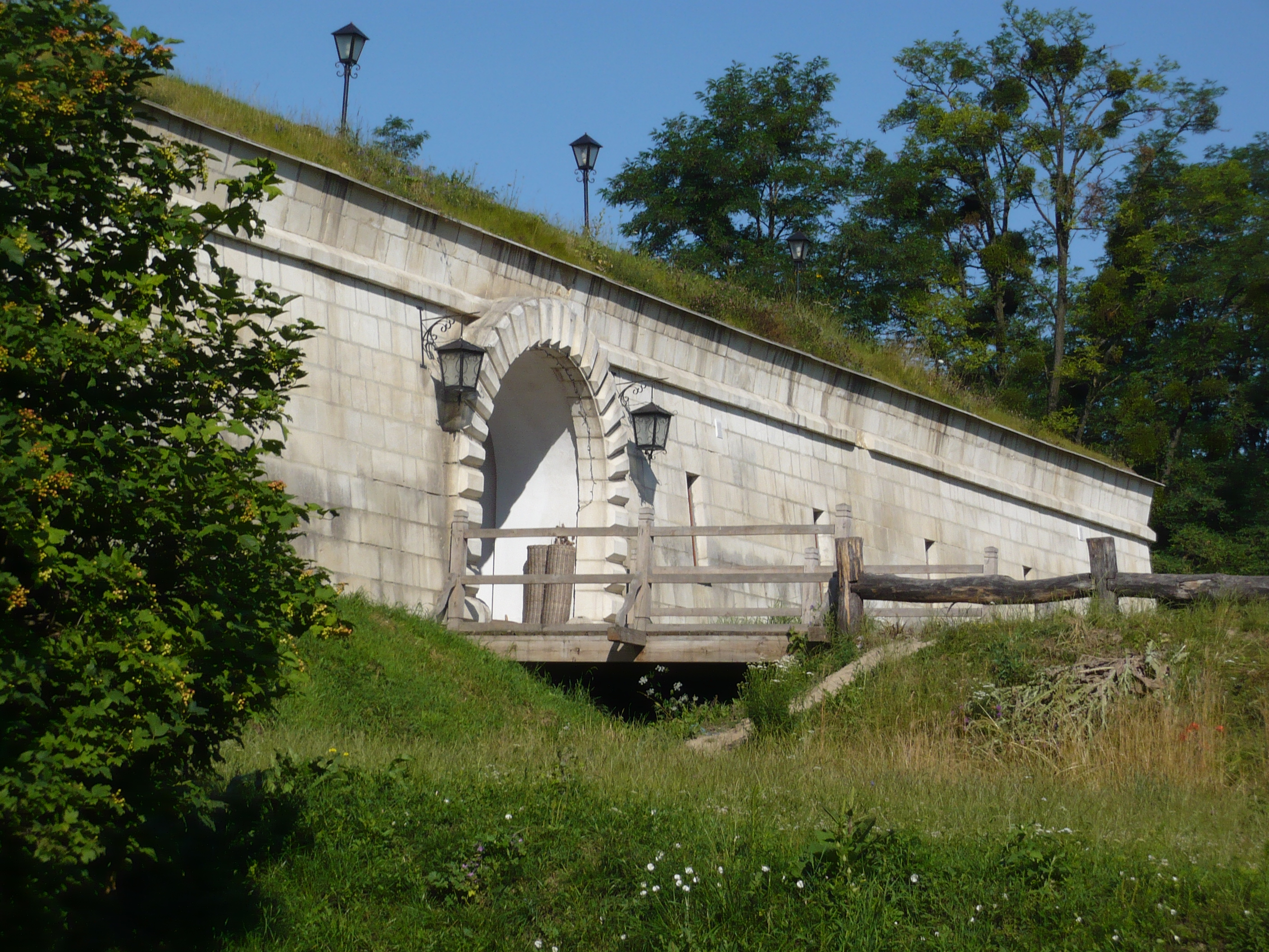 Mur z bramą zamku w Złoczowie